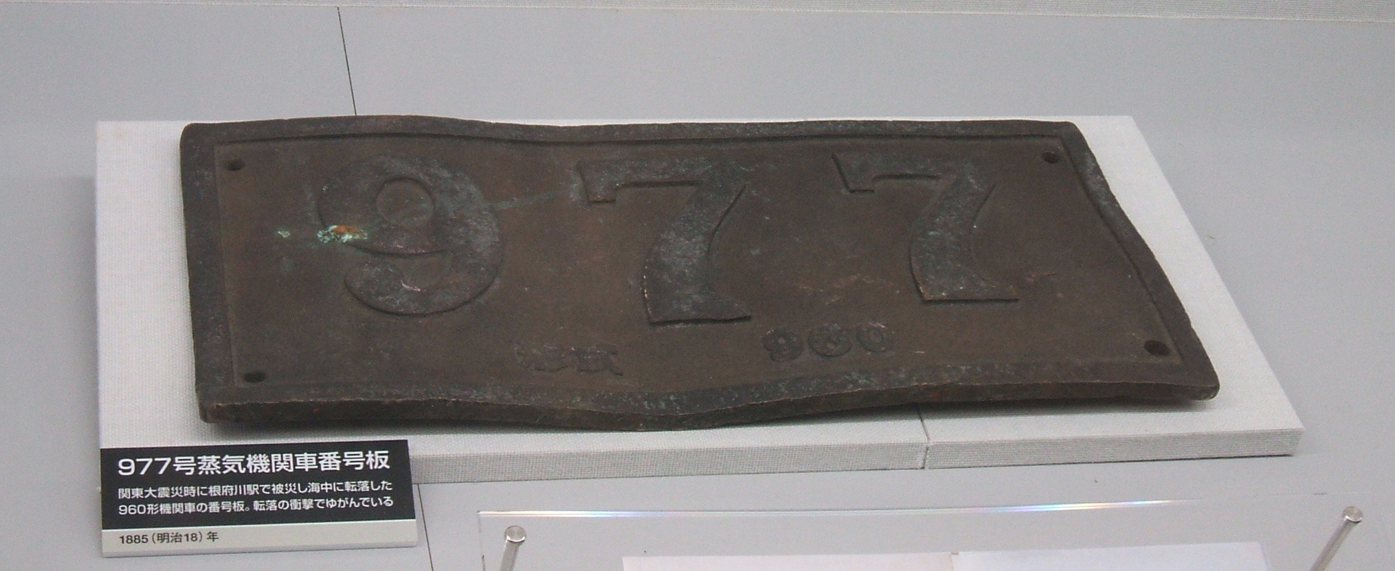 1923年9月1日に発生した根府川駅列車転落事故の事故車両である国鉄5300形蒸気機関車 のナンバープレート「977」。日本の鉄道博物館に展示